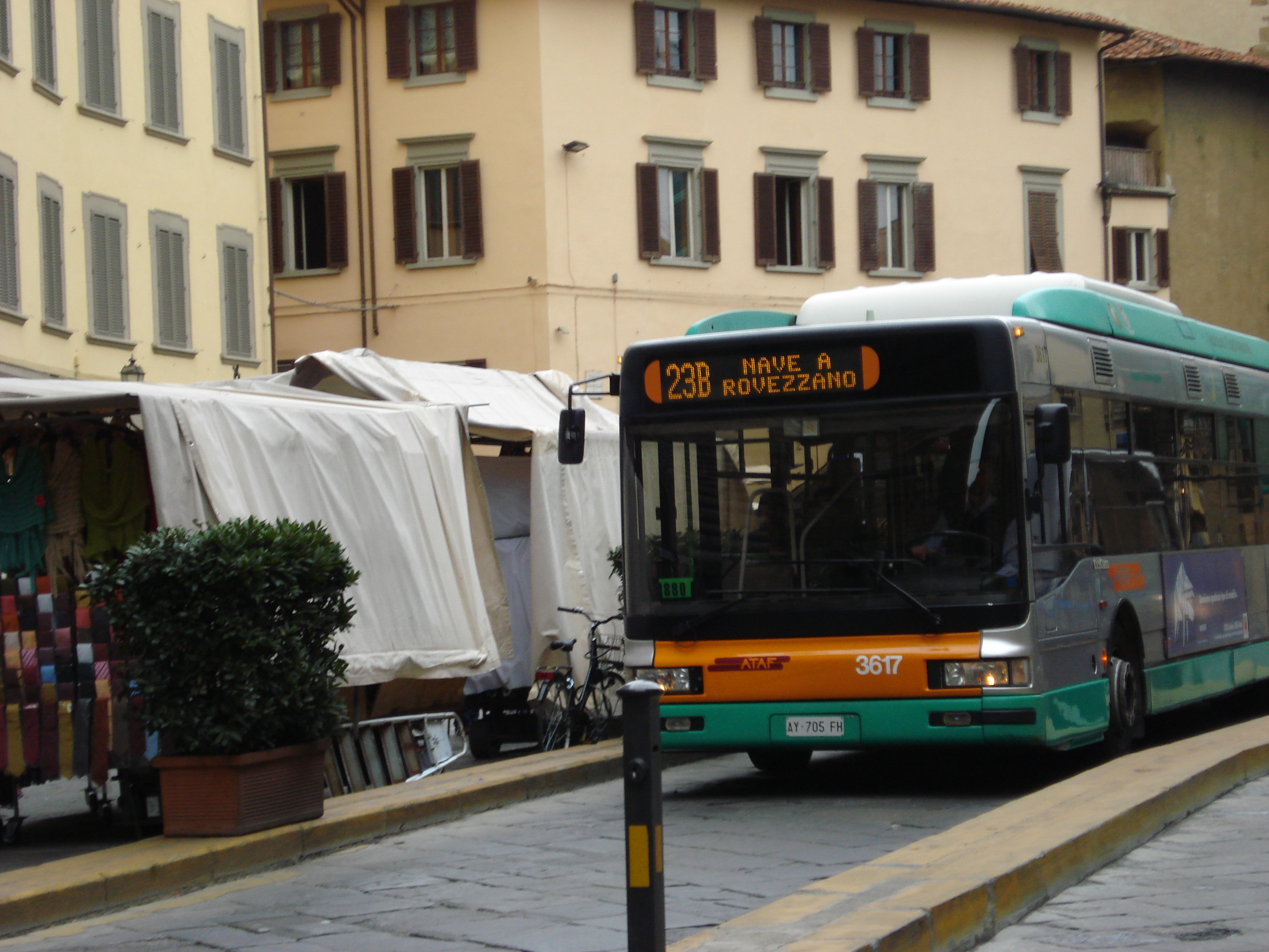 Autobús Iveco 491E.12.22 CNG CityClass de la línia 23B amb direcció a Nave a Rovezzano.